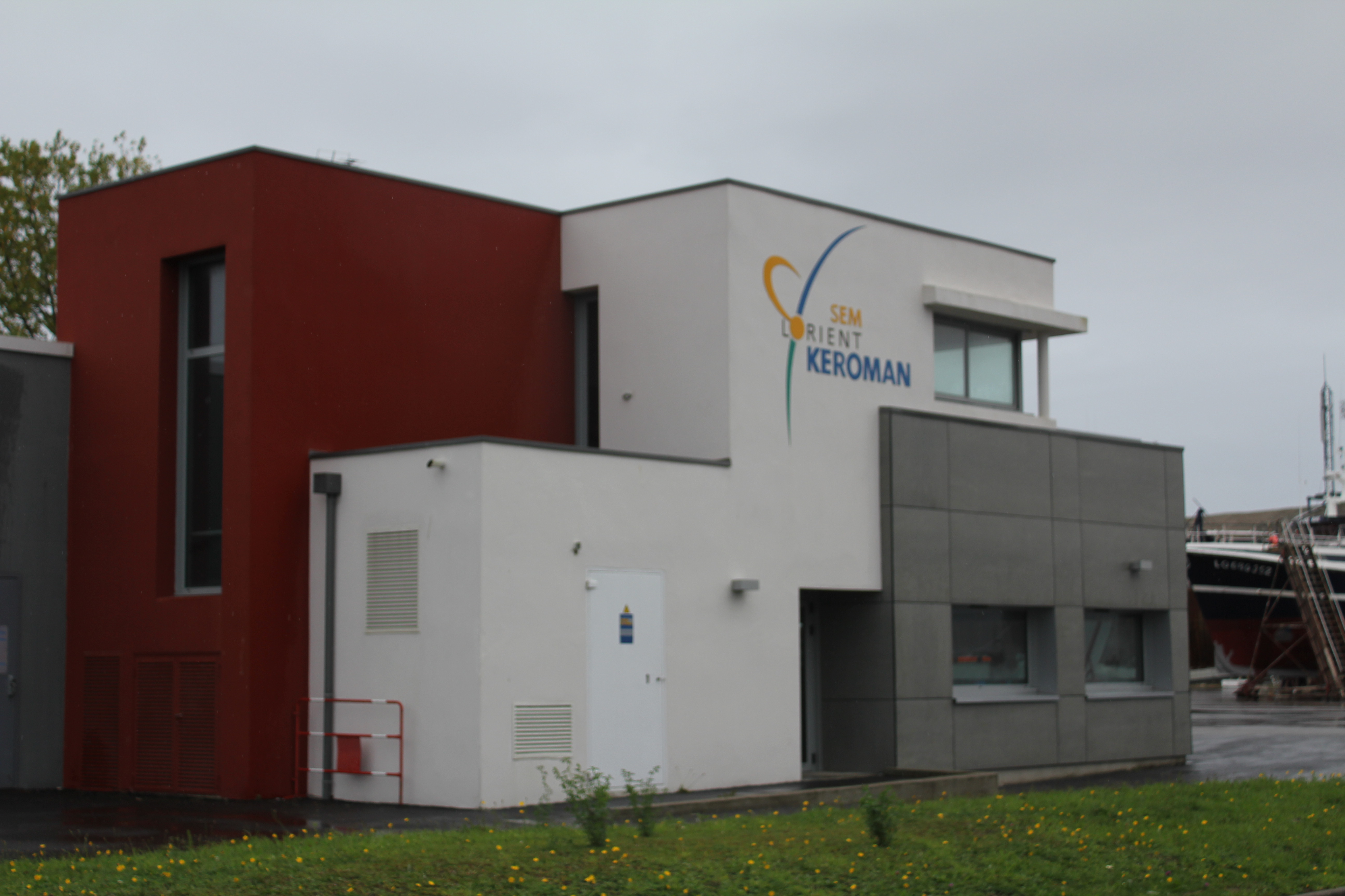 Locaux de la société d'économie mixte de Lorient-Keroman dans le port de pêche de Keroman à Lorient